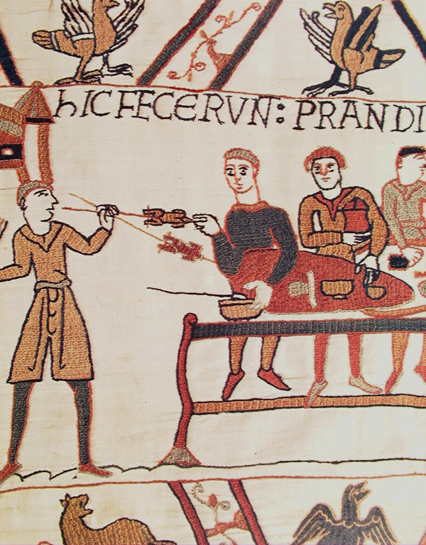 Szene aus dem Teppich von Bayeux. Schilde werden als Unterlage zum Essen genutzt